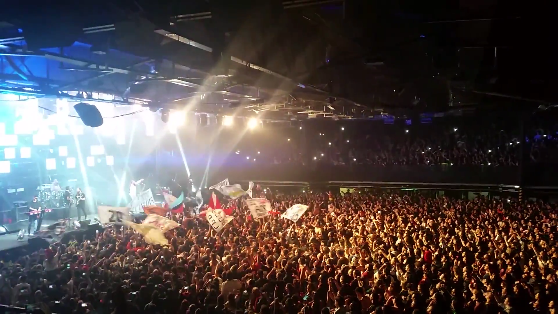 El Estadio Obras Sanitarias, "el templo del rock argentino", en un recital.